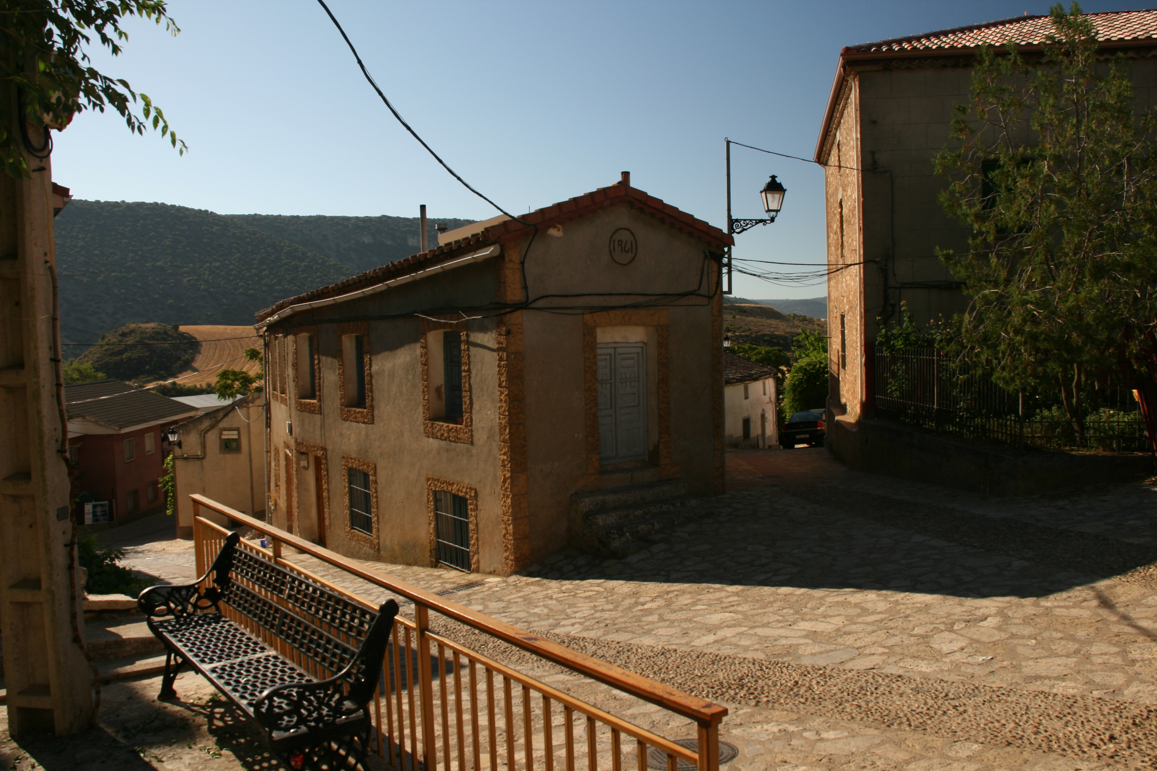 Riba de Saelices, Guadalajara, España